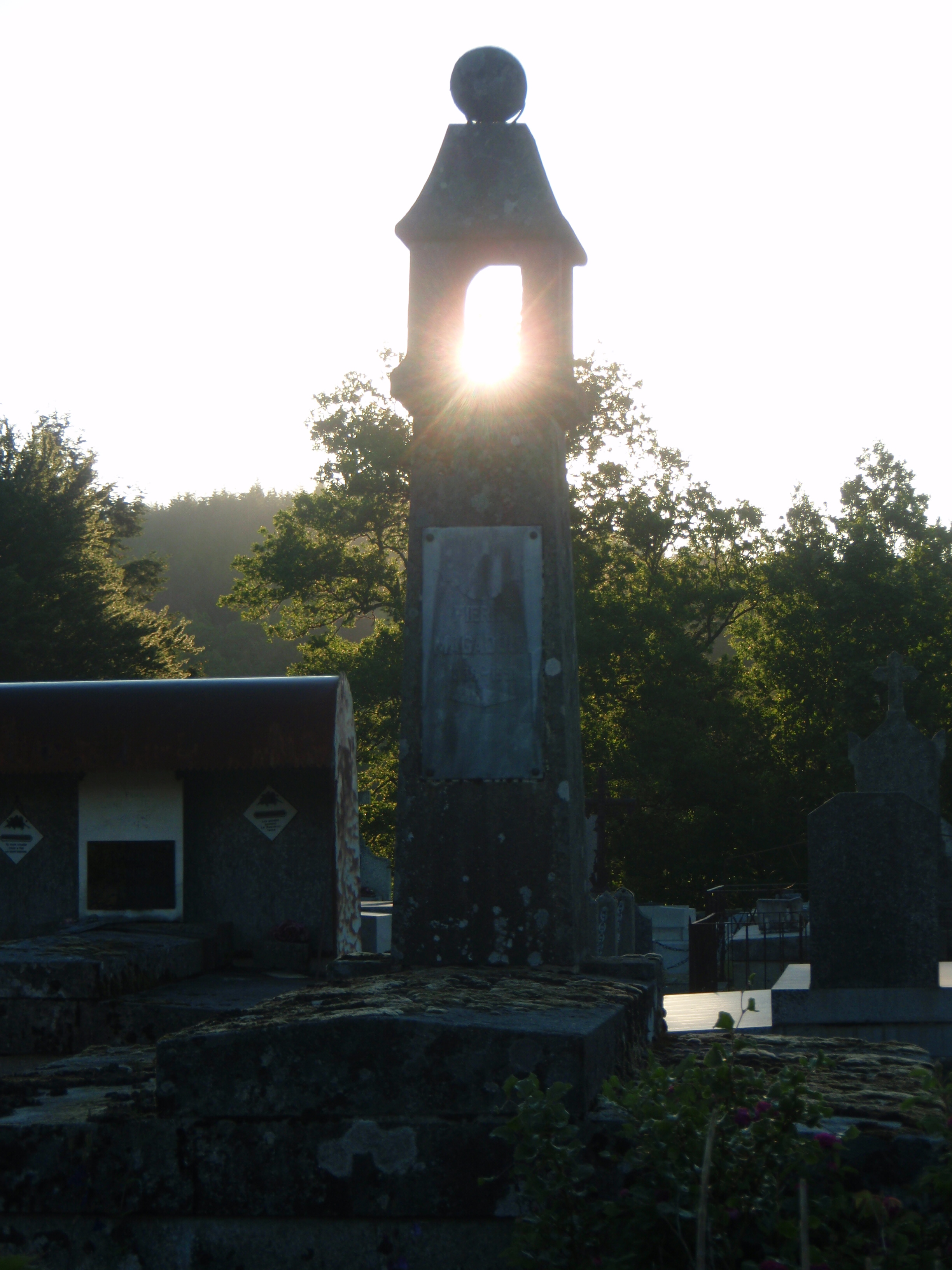 Royere de Vassivière Lanterne des morts du cimetière